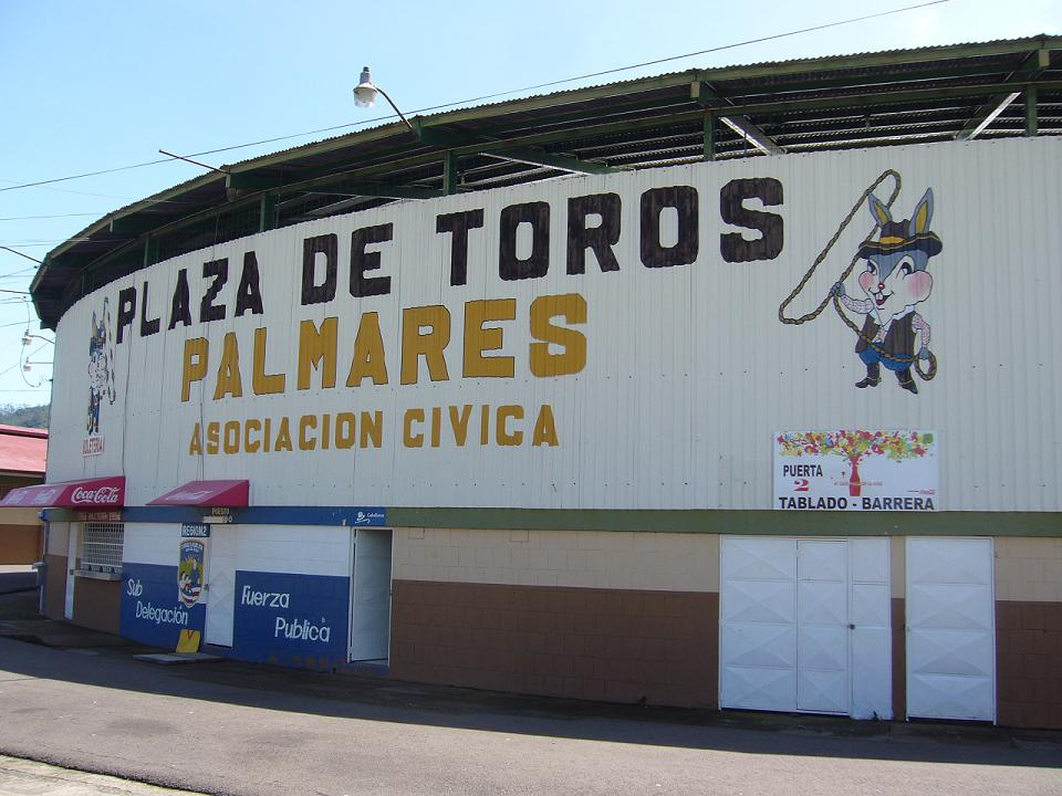 Plaza de Toros, Palmares (2)